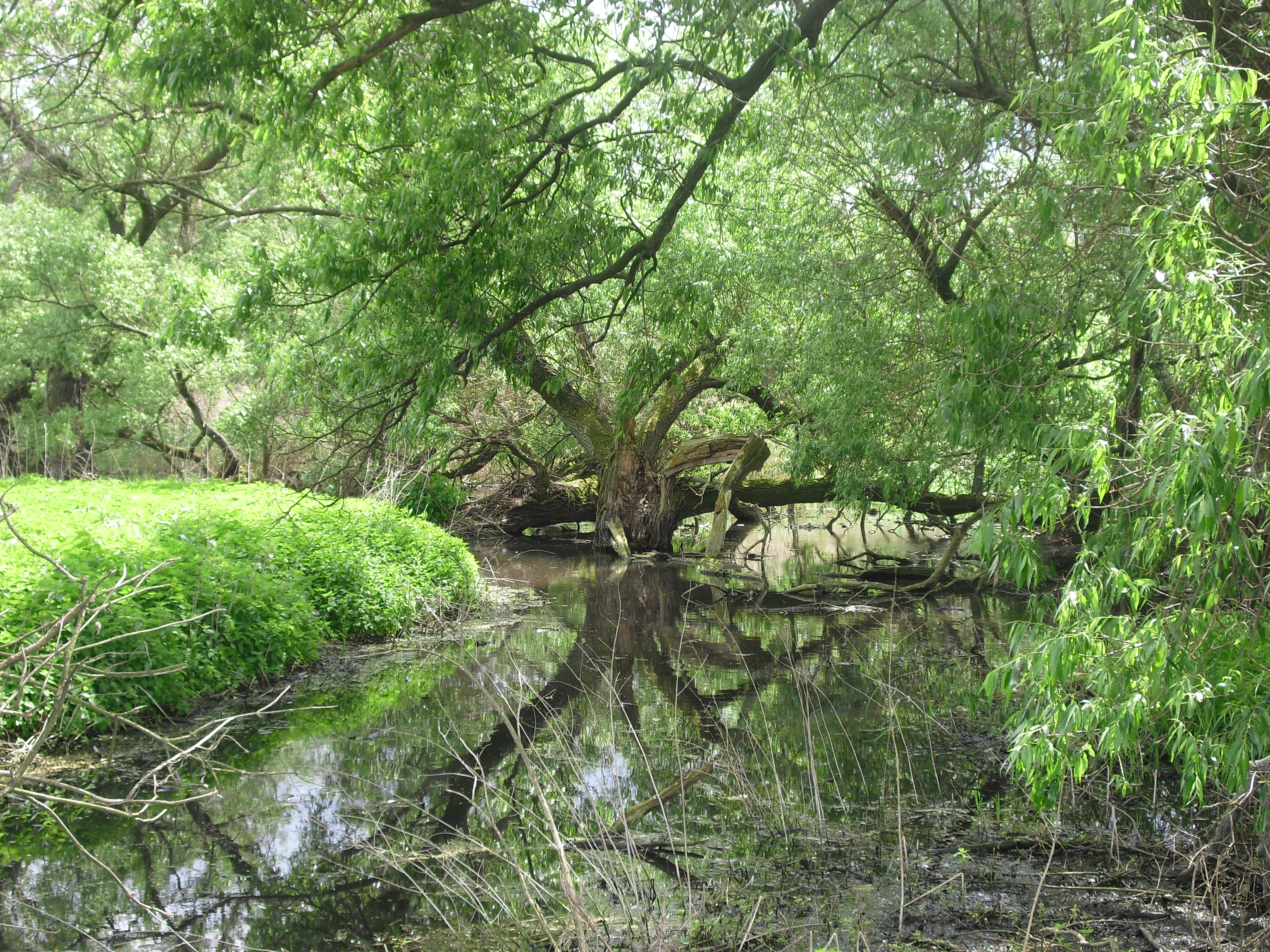 Mokřad Bašnov u Střížovic